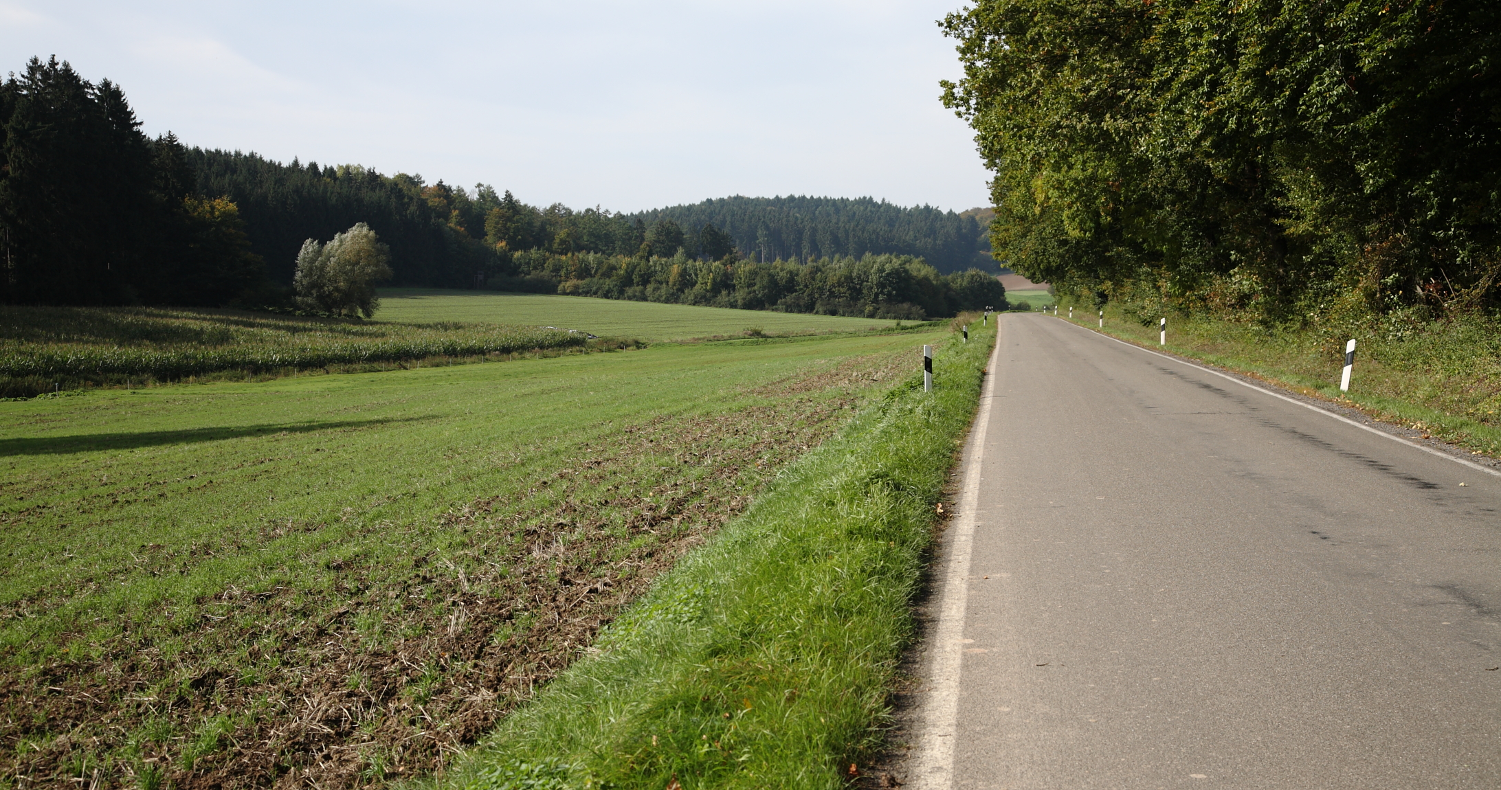 K15 zwischen Ikenhausen und Engar im Tal der Eder (Richtung Ikenhausen).